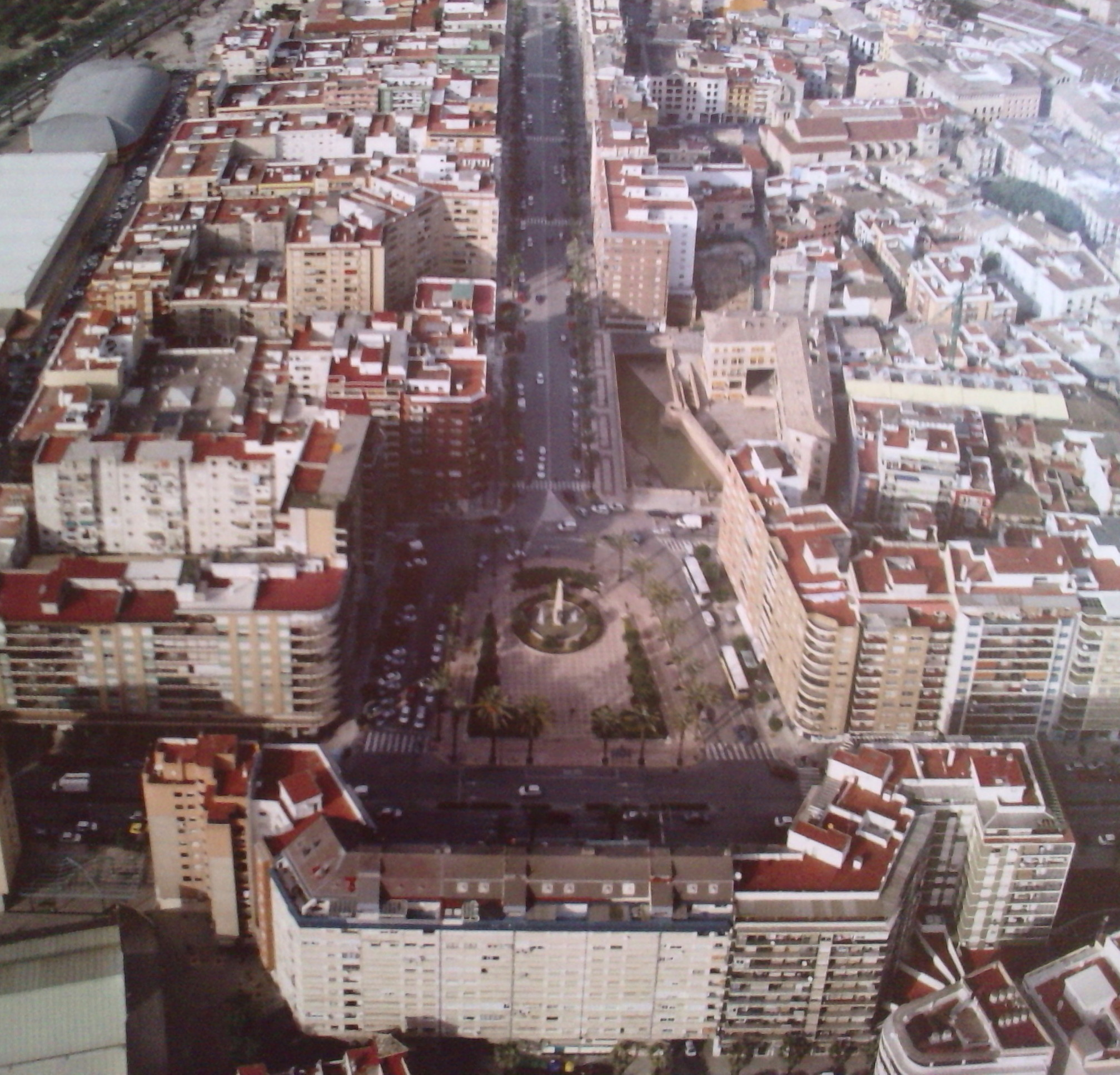 Vista de la plaza del Reino en el centro urbano de Alzira